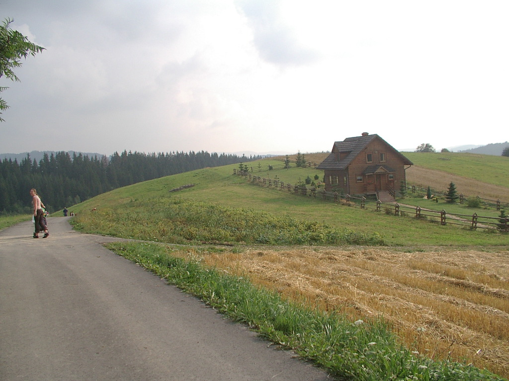 Jaworzynka Trzycatek, południowy kraniec wsi, widok w stronę Słowacji.